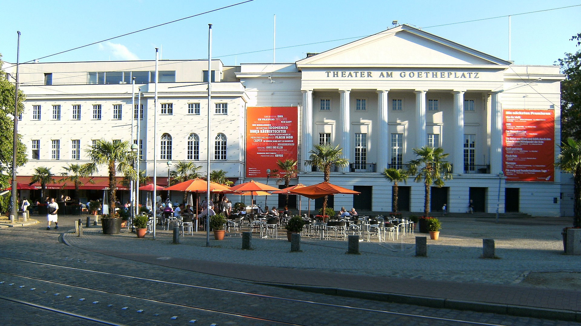 Schauspielhaus am Ostertor, Theater am Goetheplatz in Bremen, Goetheplatz 1. Das abgebildete Objekt ist ein geschütztes Kulturdenkmal in der Freien Hansestadt Bremen, mit der Nr. 1722 beim Landesamt für Denkmalpflege registriert.